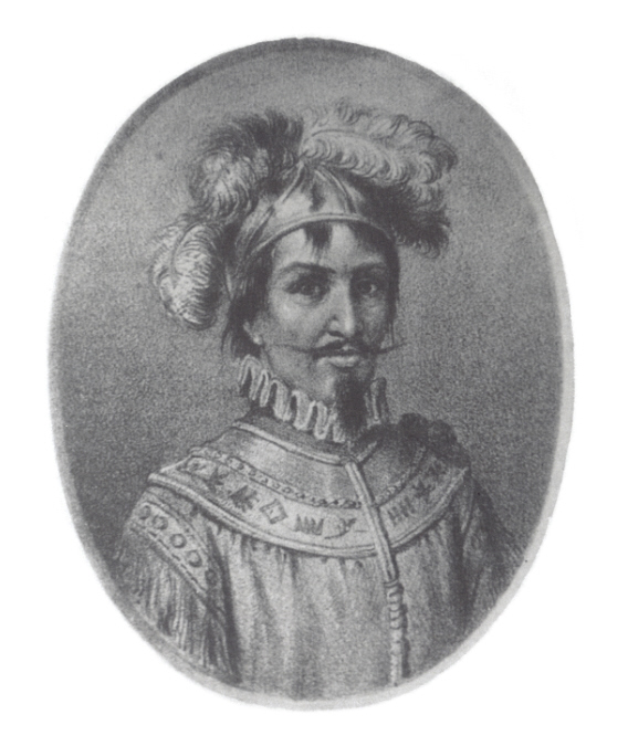 Retrato del Mariscal Jorge Robledo. Imagen elaborada en el siglo XIX.